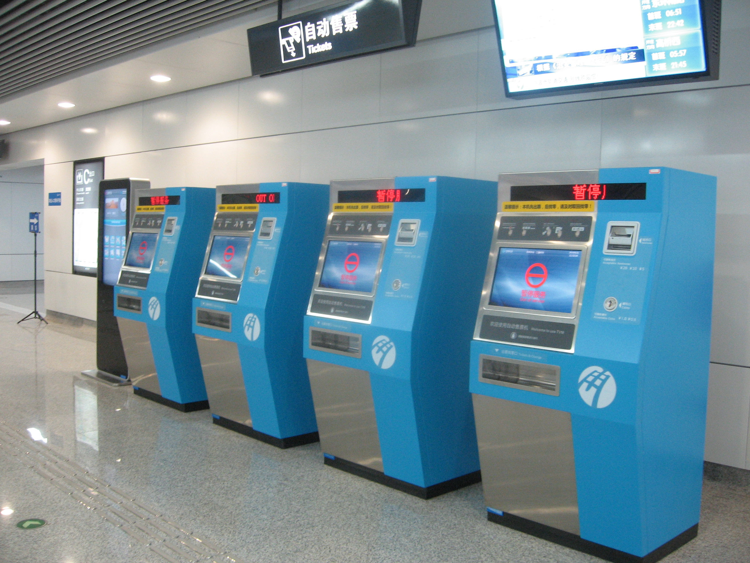 一号线，VTM